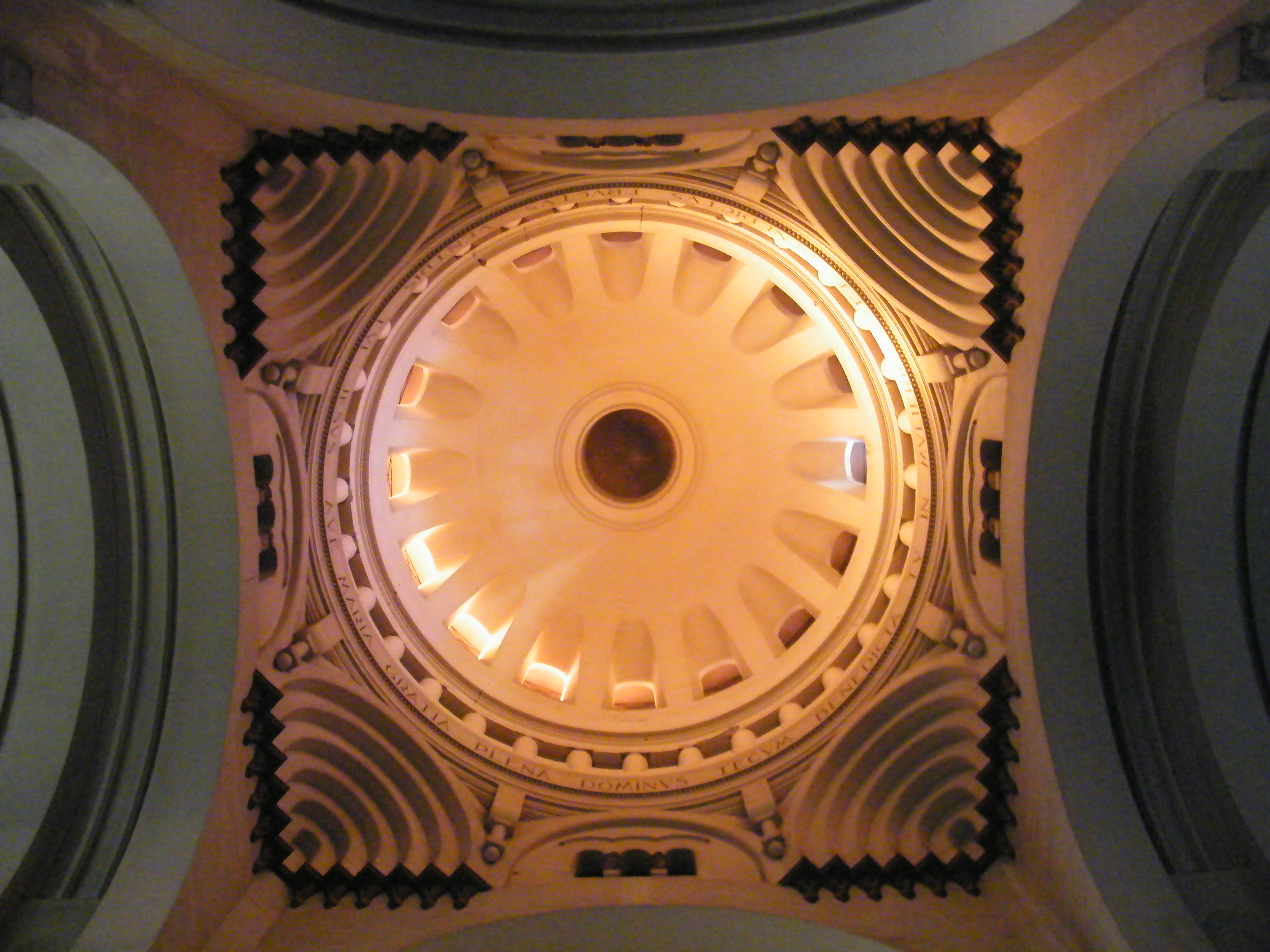 Imágenes Santuario Lourdes(Chile), Basílica.